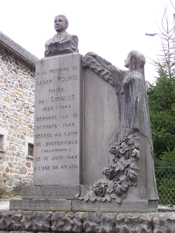 Monument de Léger Fouris à Singles (63)